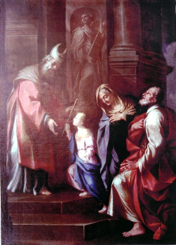 Presentación de la Virgen en el Templotitle QS:P1476,es:"Presentación de la Virgen en el Templo"